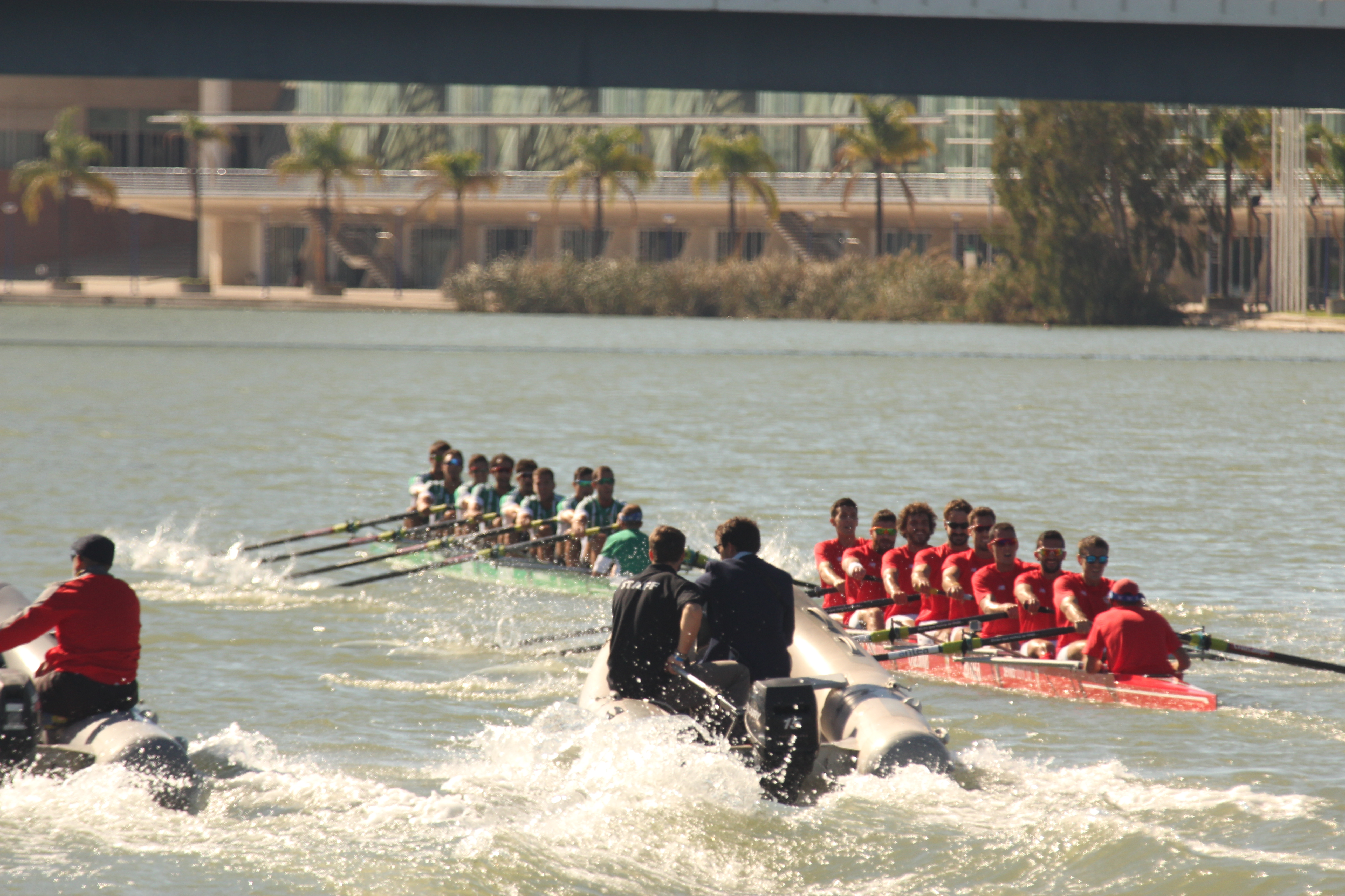 Imágen de la Regtata Sevilla-Betis de 2015 aproximadamente a mitad de recorrido, en la que la embarcación bética va en cabeza por algo más de un barco de distancia sobre la embarcación sevillista